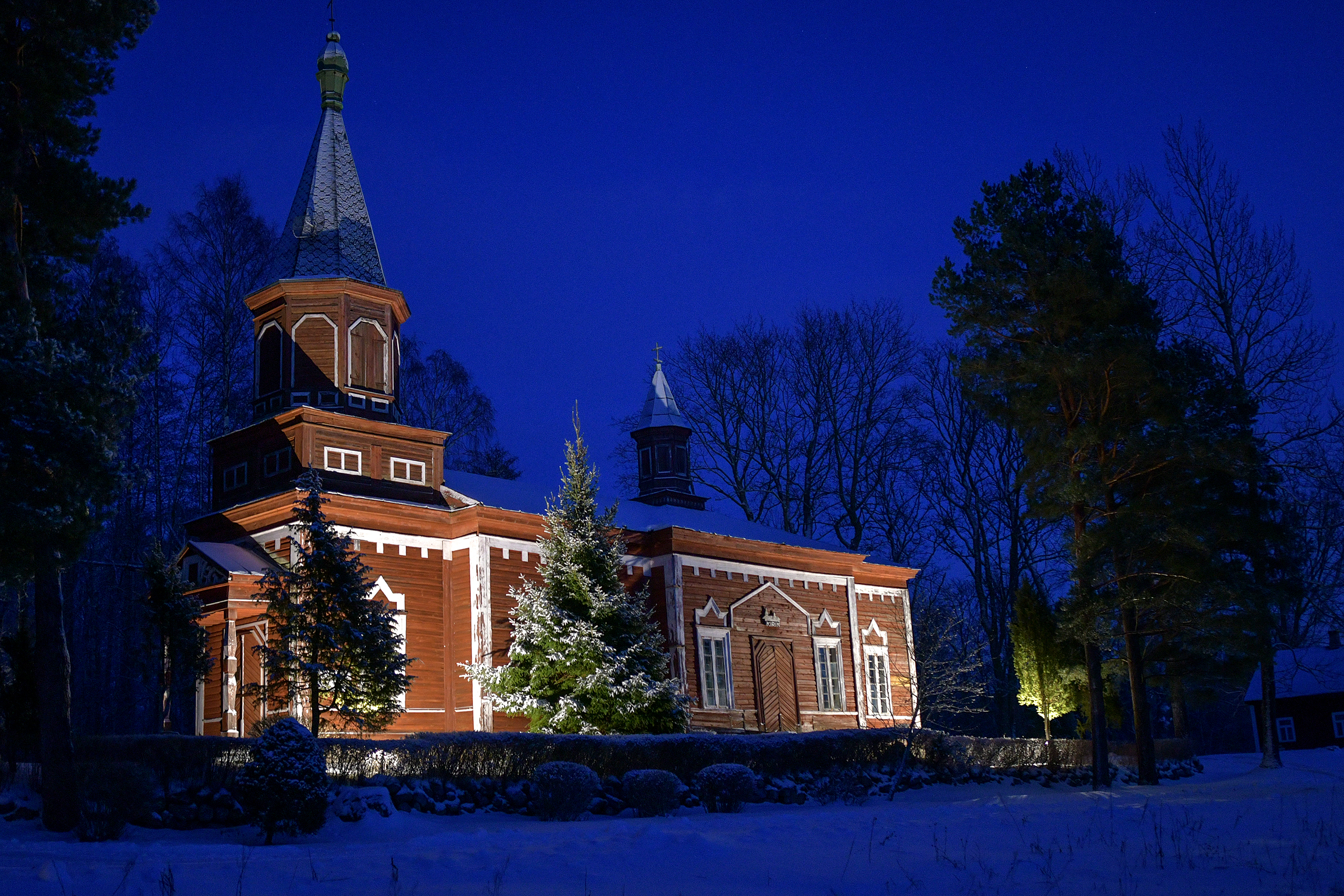 Seliste kirik talveõhtul